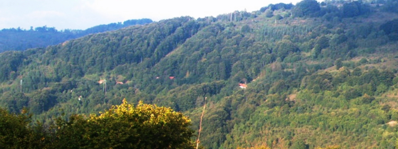 Битврђа.